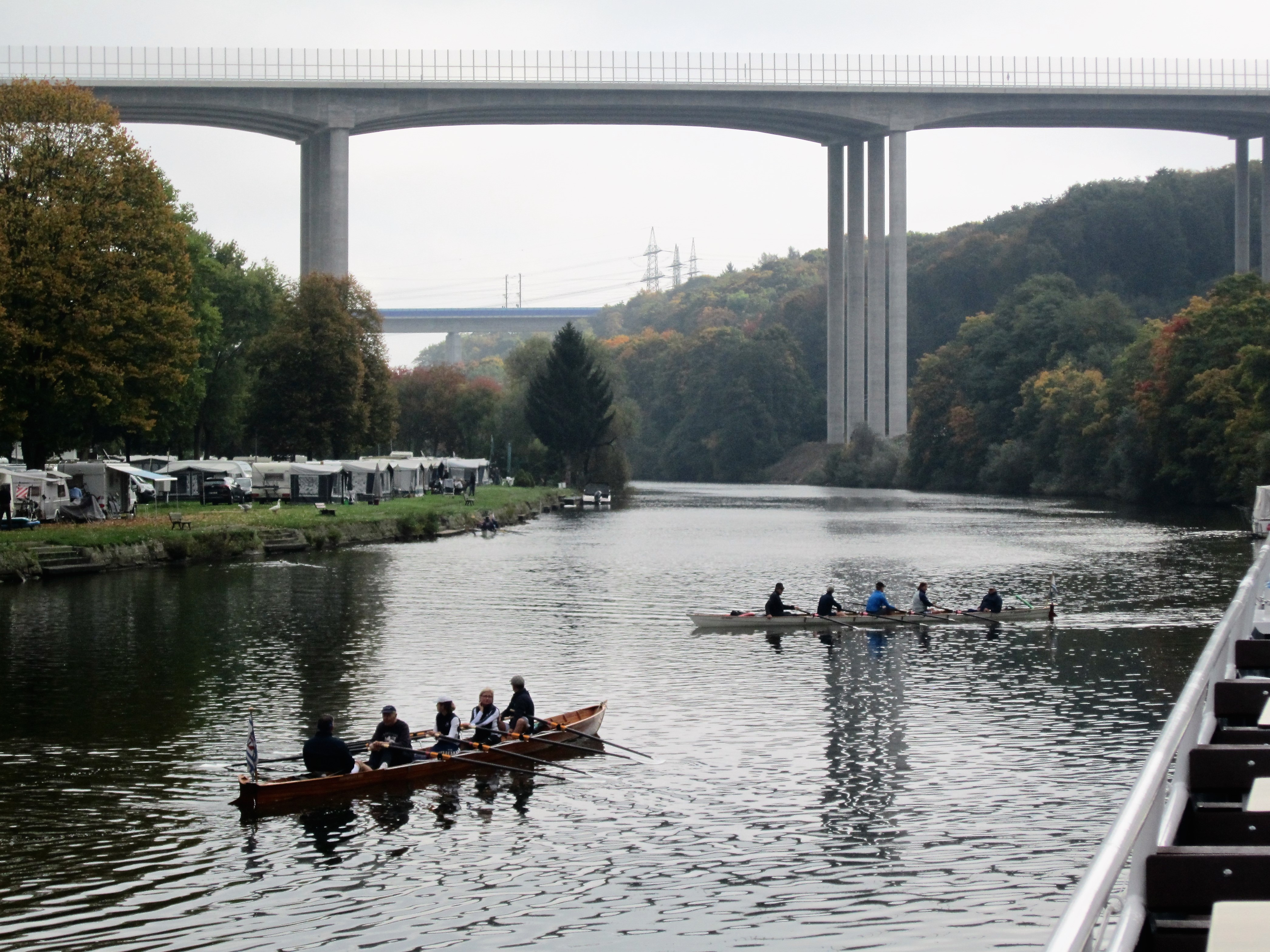 Lahnpatie oberhalb von Limburg. Im Hintergrund die Brücken der BAB 3 und der ICE-Linie Frankfurt - Köln; am linken Ufer ist der Camingplatz Limburg zu erkennen (2017).